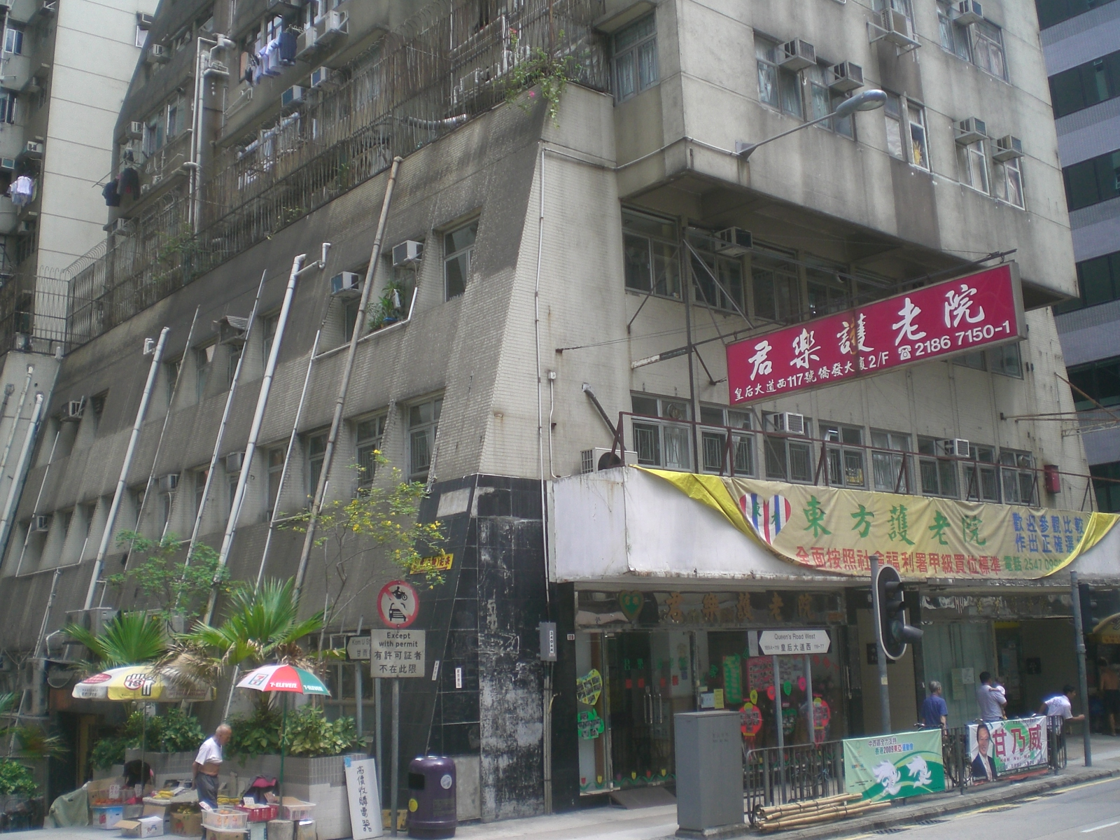 甘雨街僑發大廈